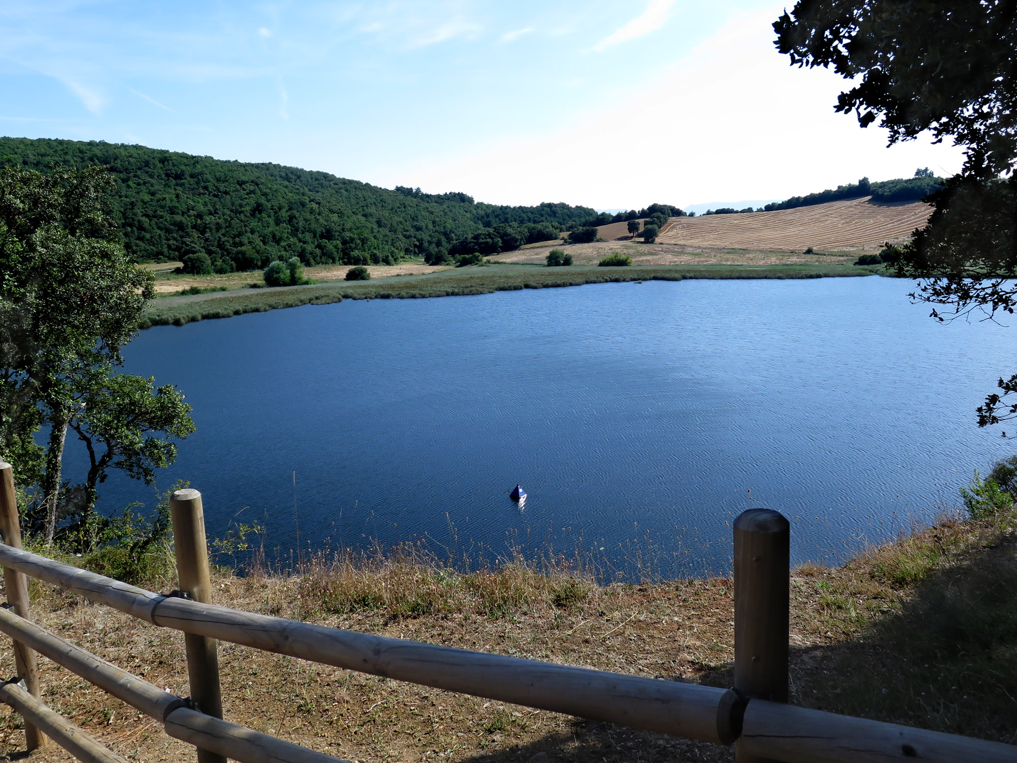 Lago de Arreo en Álava (País Vasco, España)